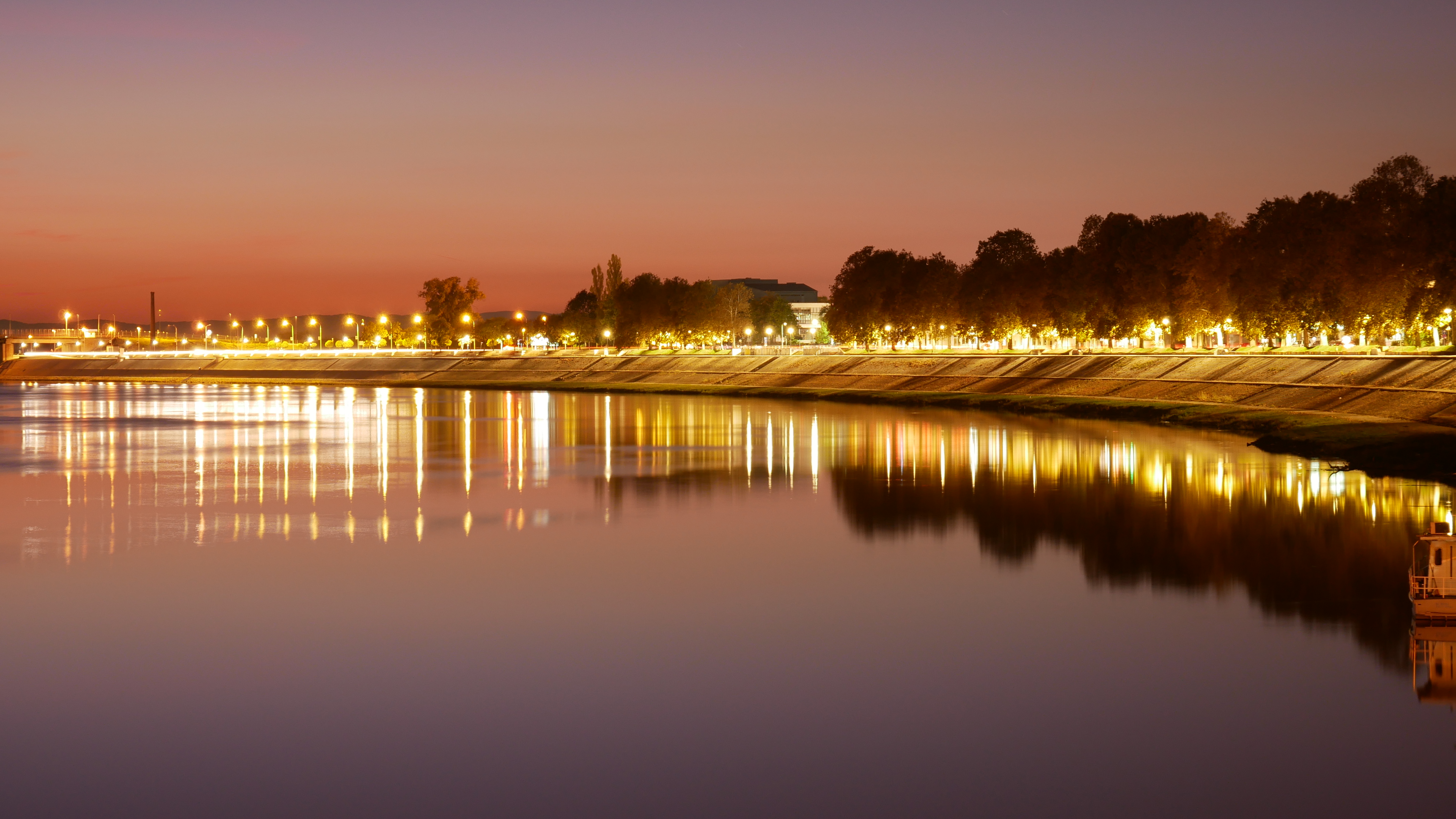 Šetnica uz rijeku Savu u Slavonskom Brodu